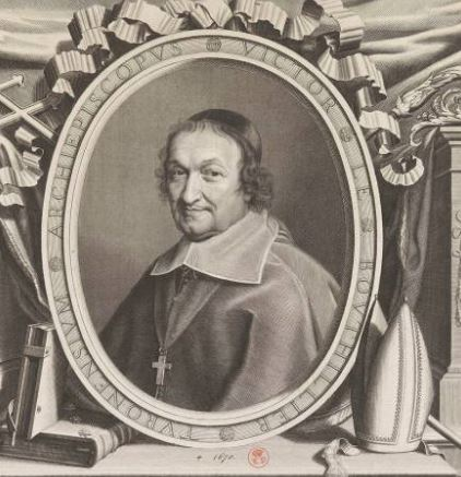 Portrait de Victor Le Bouthillier par Robert Nanteuil